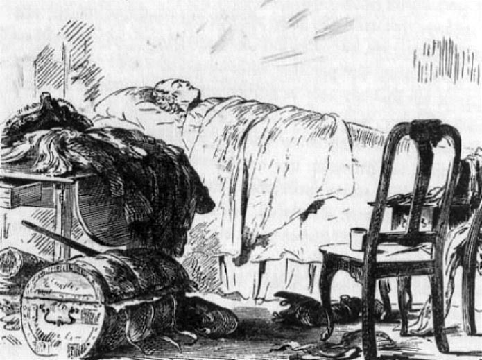 GL Hans Karl von Winterfeldt auf dem Sterbebett im Hause Obermarkt 8. Nicht zeitgenössische Zeichnung